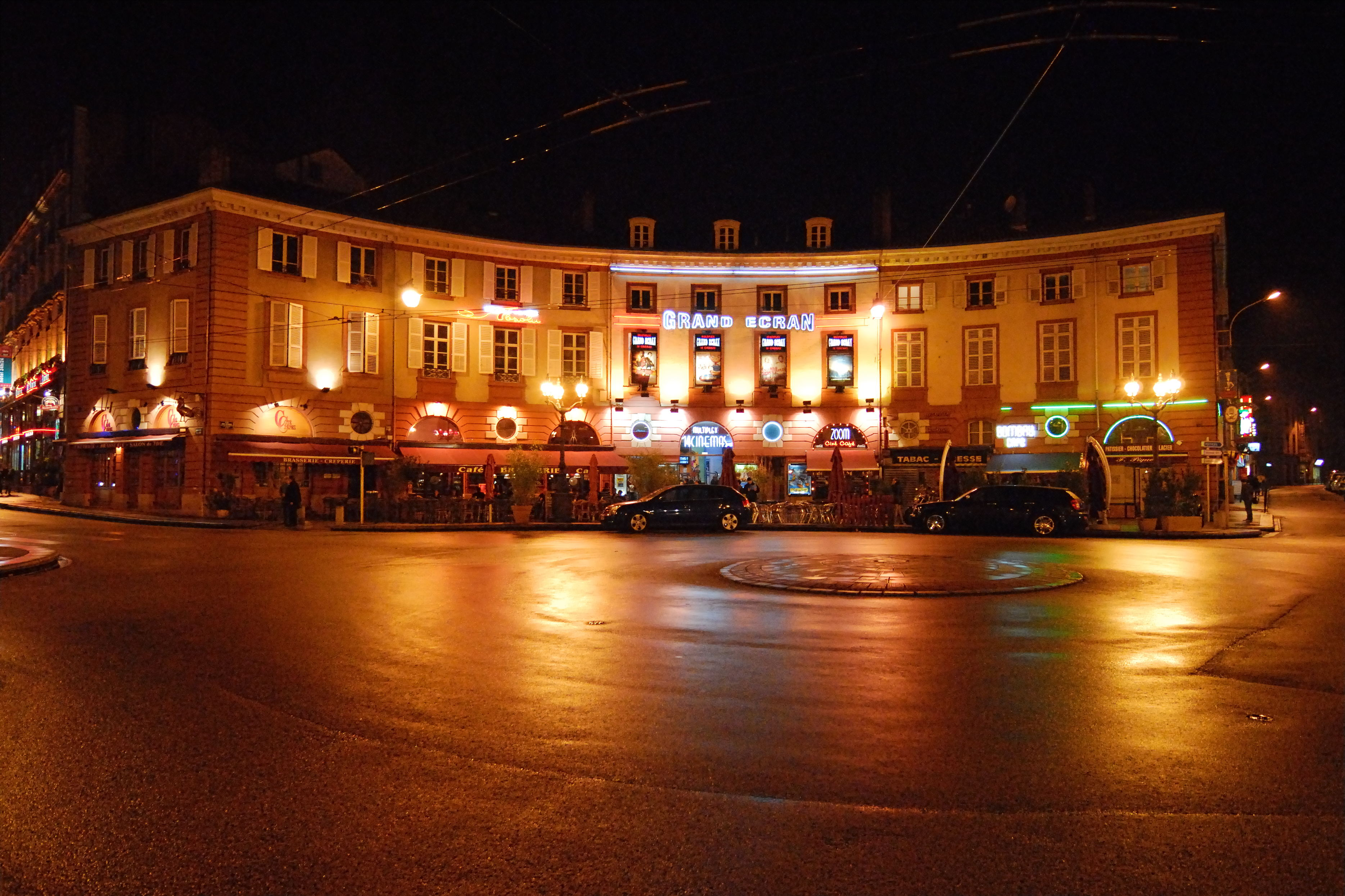 La palce Denis Dussoubs à limoges